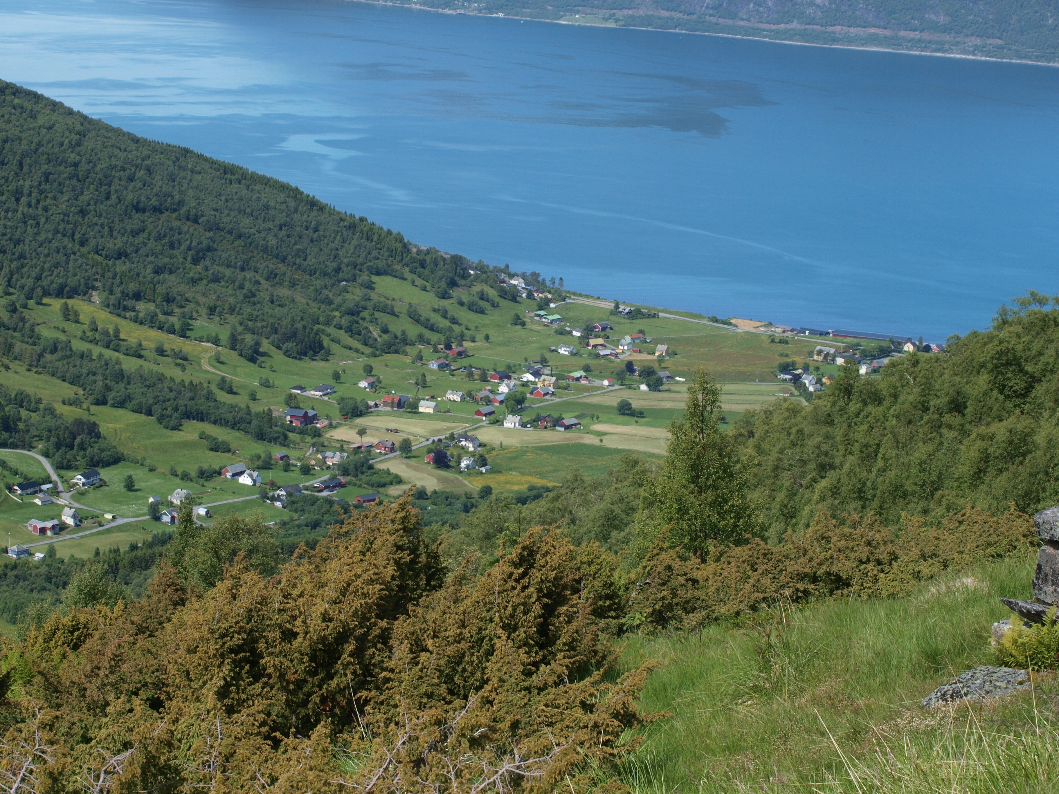 Barstadvik Ørsta, Møre og Romsdal